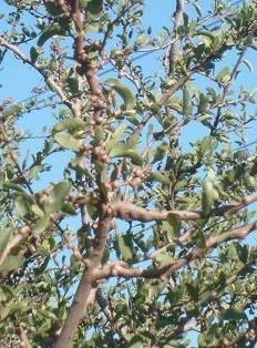 Stamm-cecidien aus Schinus polygama. Winter-Tipus, Chile